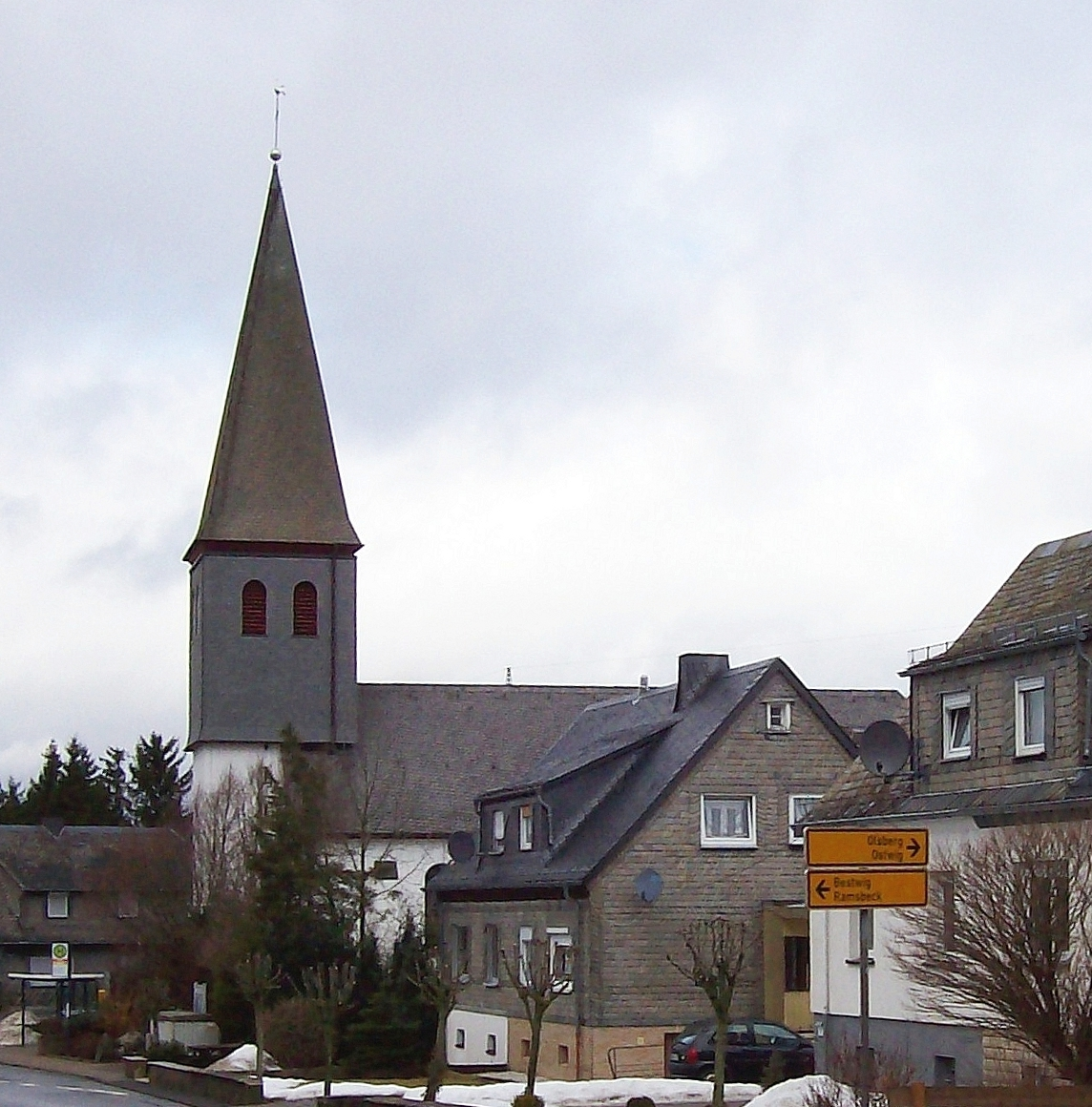 Bestwig-Andreasberg (Germany)